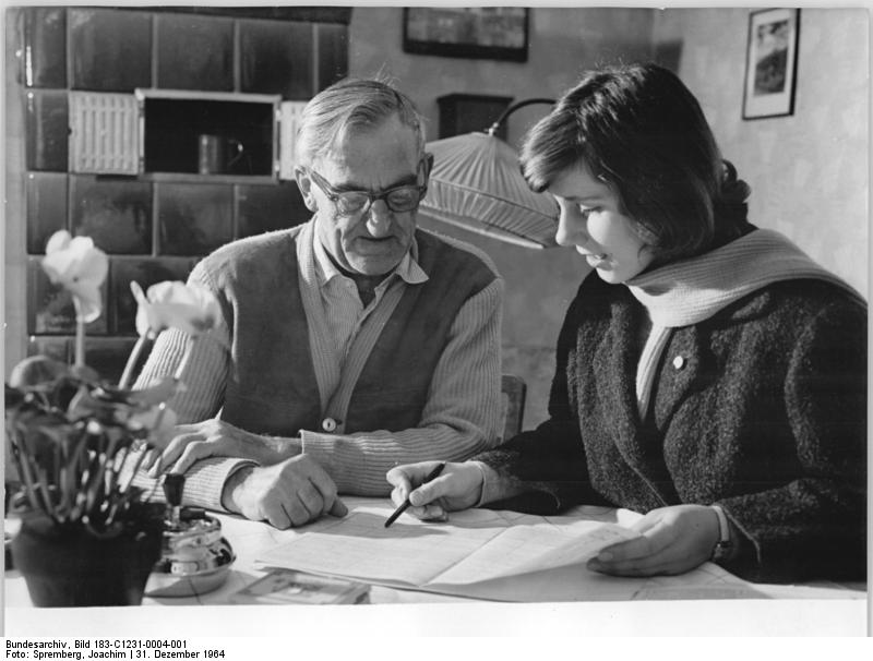 Berlin, Volkszählung Zentralbild Spremberg 31.12.1964 Rund 30.000 ehrenamtliche Helfer der Volks- und Berufszählung sind in diesen Tagen in Berlin unterwegs, um vor allen Dingen älteren Bürgern und Rentnern beim Ausfüllen der Haushaltslisten zu helfen. Unser Bild zeigt Gabriela Heinze aus Berlin-Pankow, die dem Rentner Karl Schura (72) aus Berlin-Niederschönhausen die Liste ausfüllt.